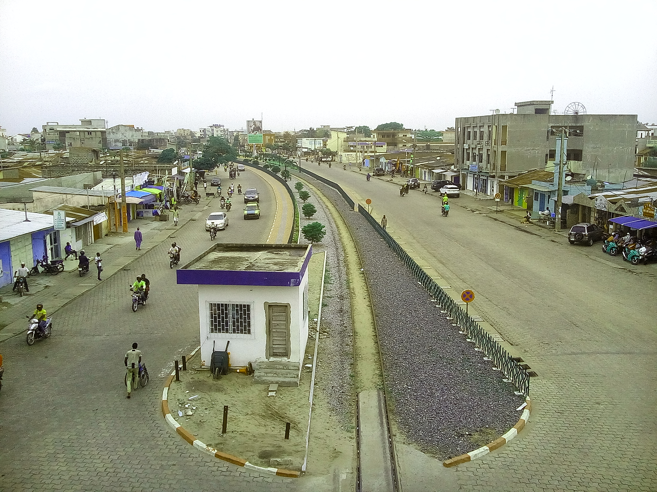 Quatier de Cotonou Houéyiho This is an image with the theme "Africa on the Move or Transport" from: Benin